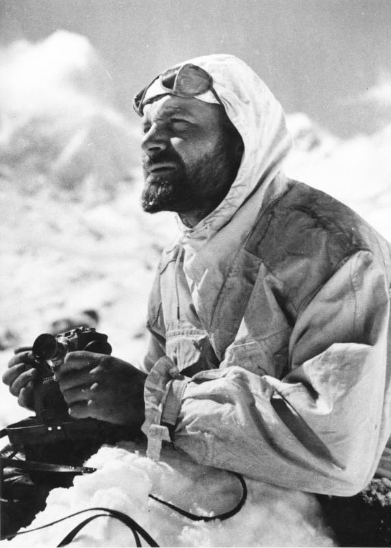 Tibetexpedition, Ernst Schäfer Zemugebiet, Dr. Schäfer Abgebildete Personen: Schäfer, Ernst Dr.: SS-Sturmbannführer, Leiter des Sven-Hedin-Institutes, Deutschland (GND 123991420)